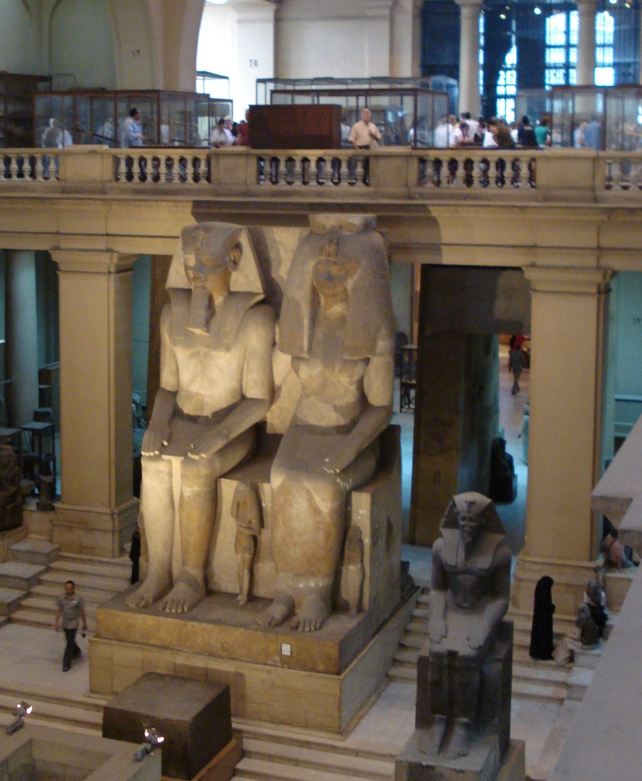 Kolossaal standbeeld van farao Amenhotep III en koningin Teje in de hal van het Egyptisch museum in Cairo